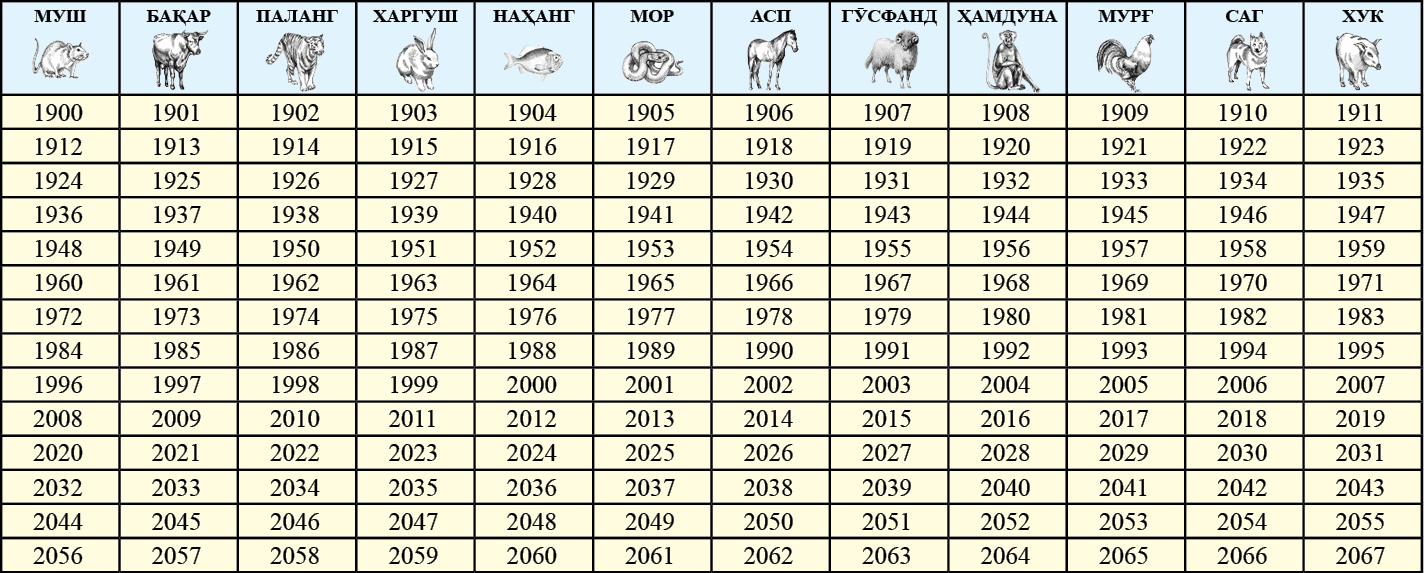 Тоҷикӣ: Мучал — солшумории дувоздаҳгона. Номгӯи солҳо: Муш – Бақар – Паланг – Харгӯш – Наҳанг – Мор – Асп – Гӯсфанд – Маймун – Мурғ – Саг – Хук.